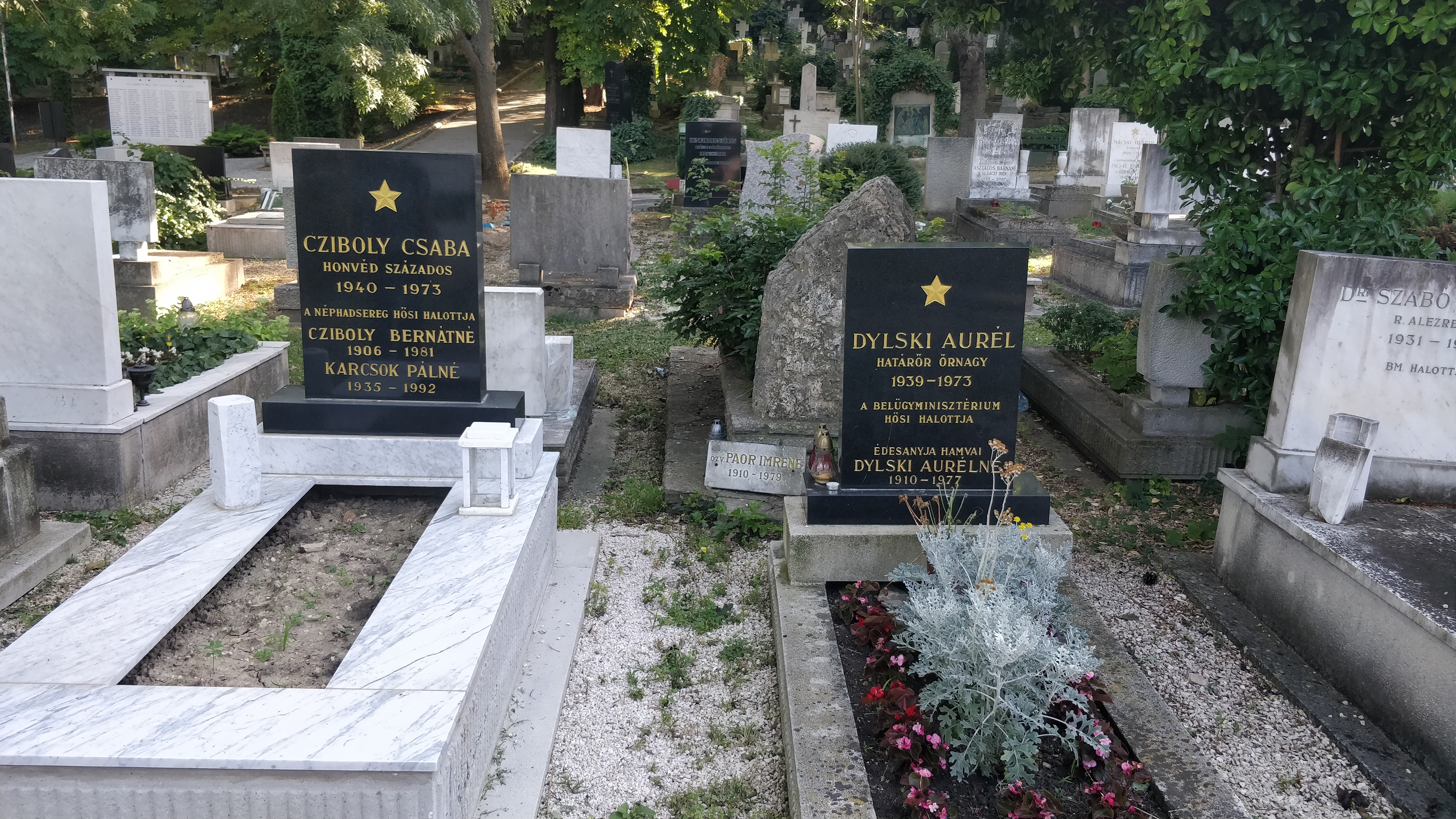 Cziboly Csaba és Dylski Aurél százados, az ICCS tagjai voltak, mely a vietnámi tűzszünet betartását felügyelte 1973-ban. Április 9-én a helikopterük tisztázatlan körülmények között lezuhant, kilenc személy (köztük a két magyar tiszt) életét vesztette.